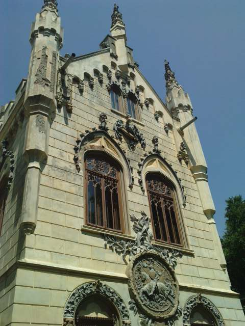 pared del castillo de sturdza